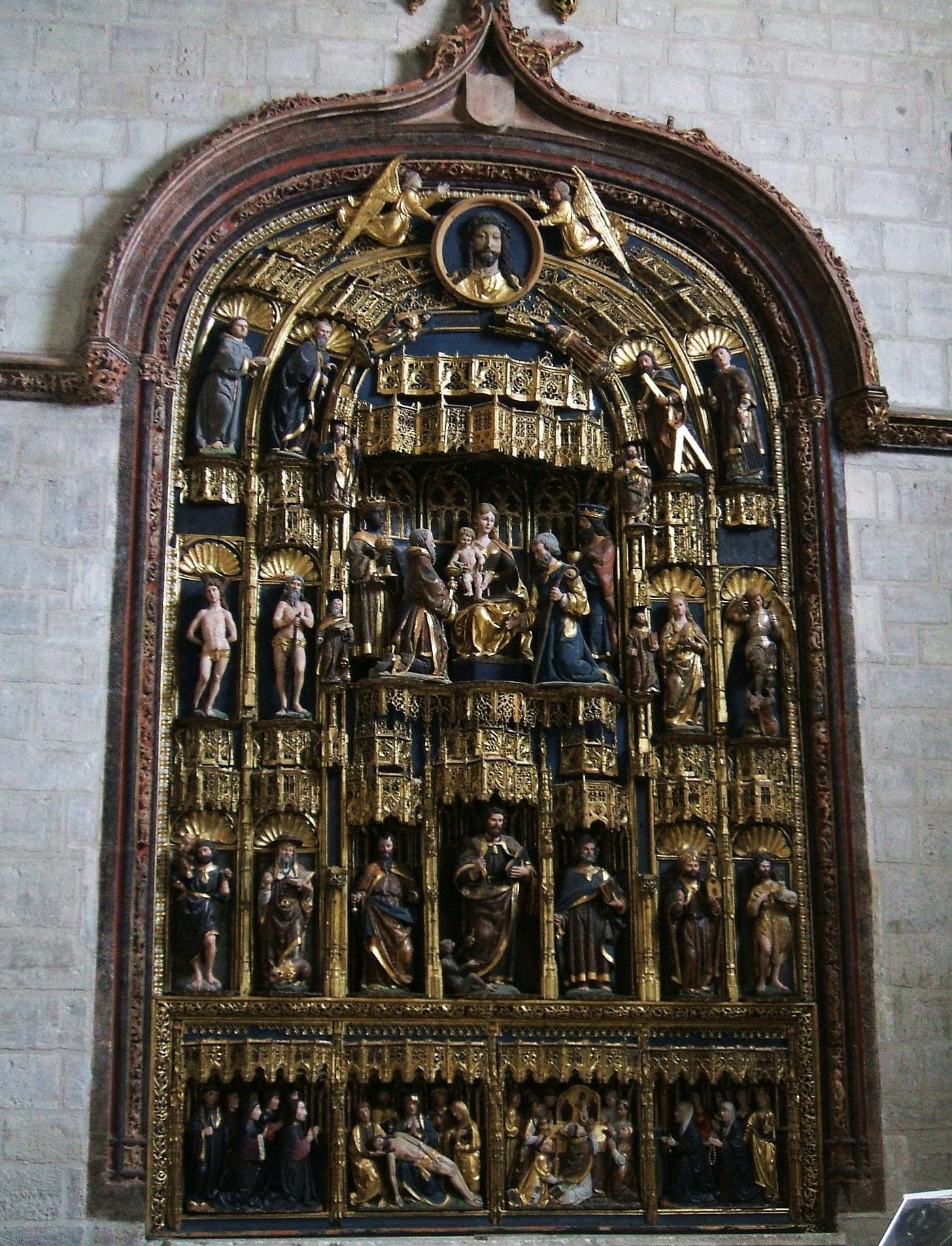 Retablo de la Capilla de los Reyes Magos, Iglesia de San Gil Abad, Burgos